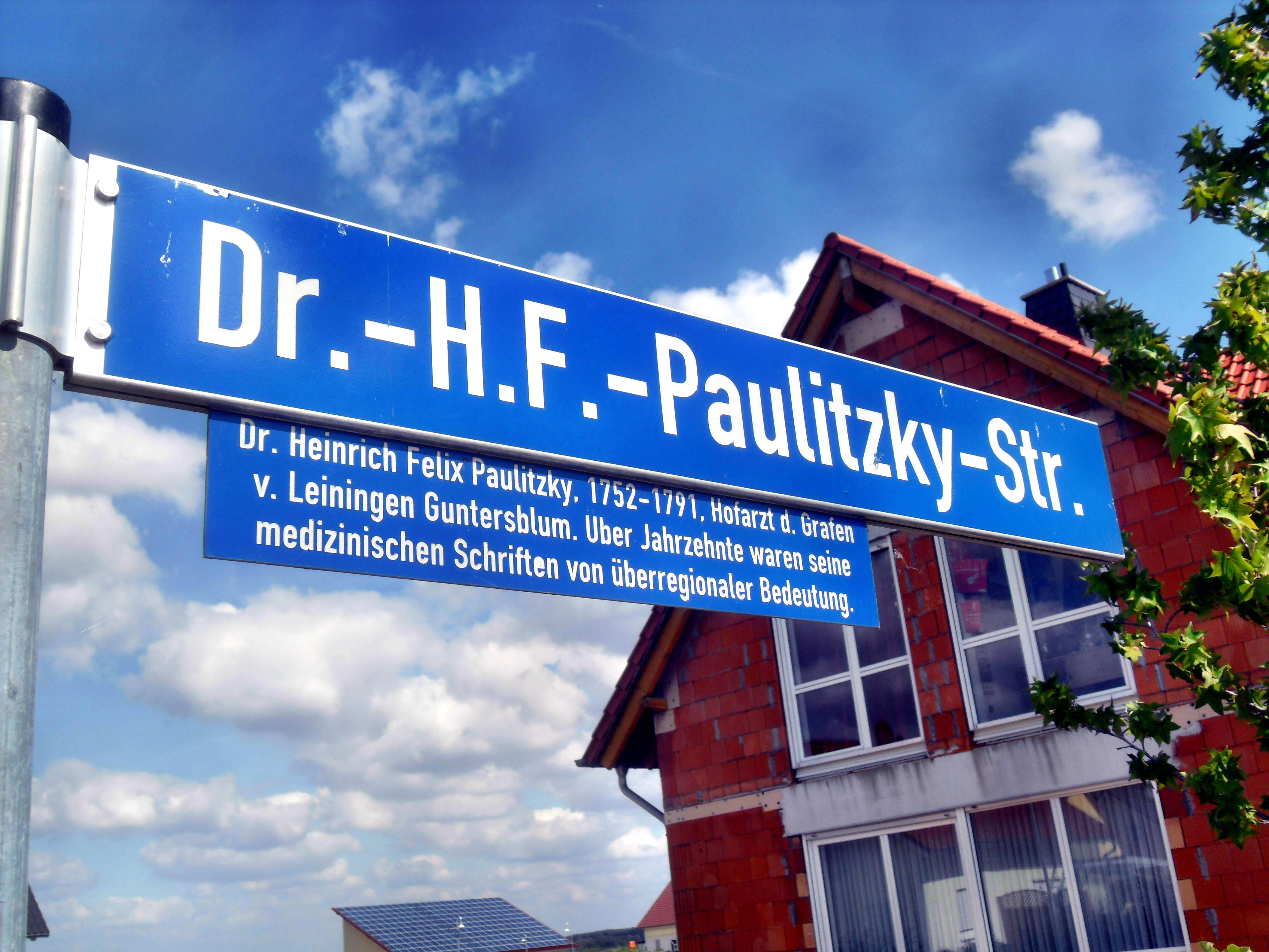 Straßenschild der Dr.-H.F.-Paulizky-Straße im rheinhessischen Guntersblum (Deutschland)